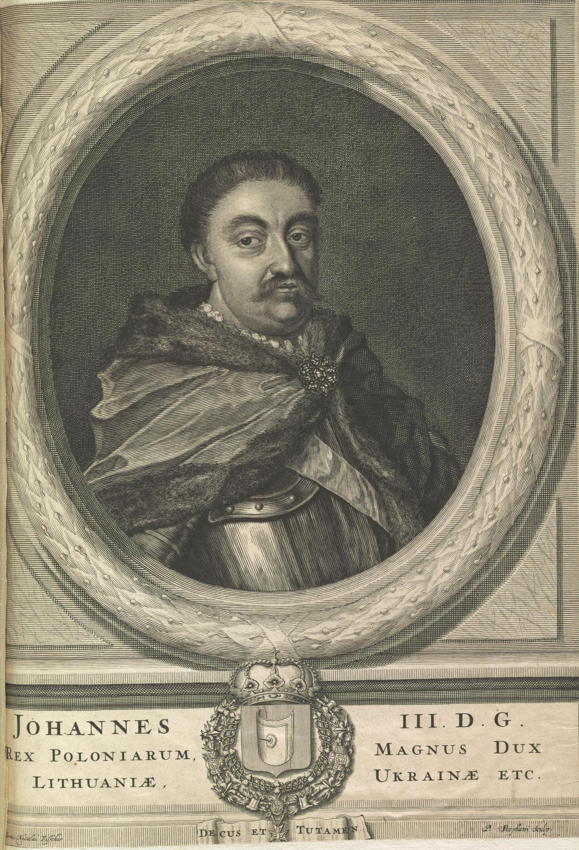 Ян III. Король Польщі, великий князь Литви, України тощо (1689)